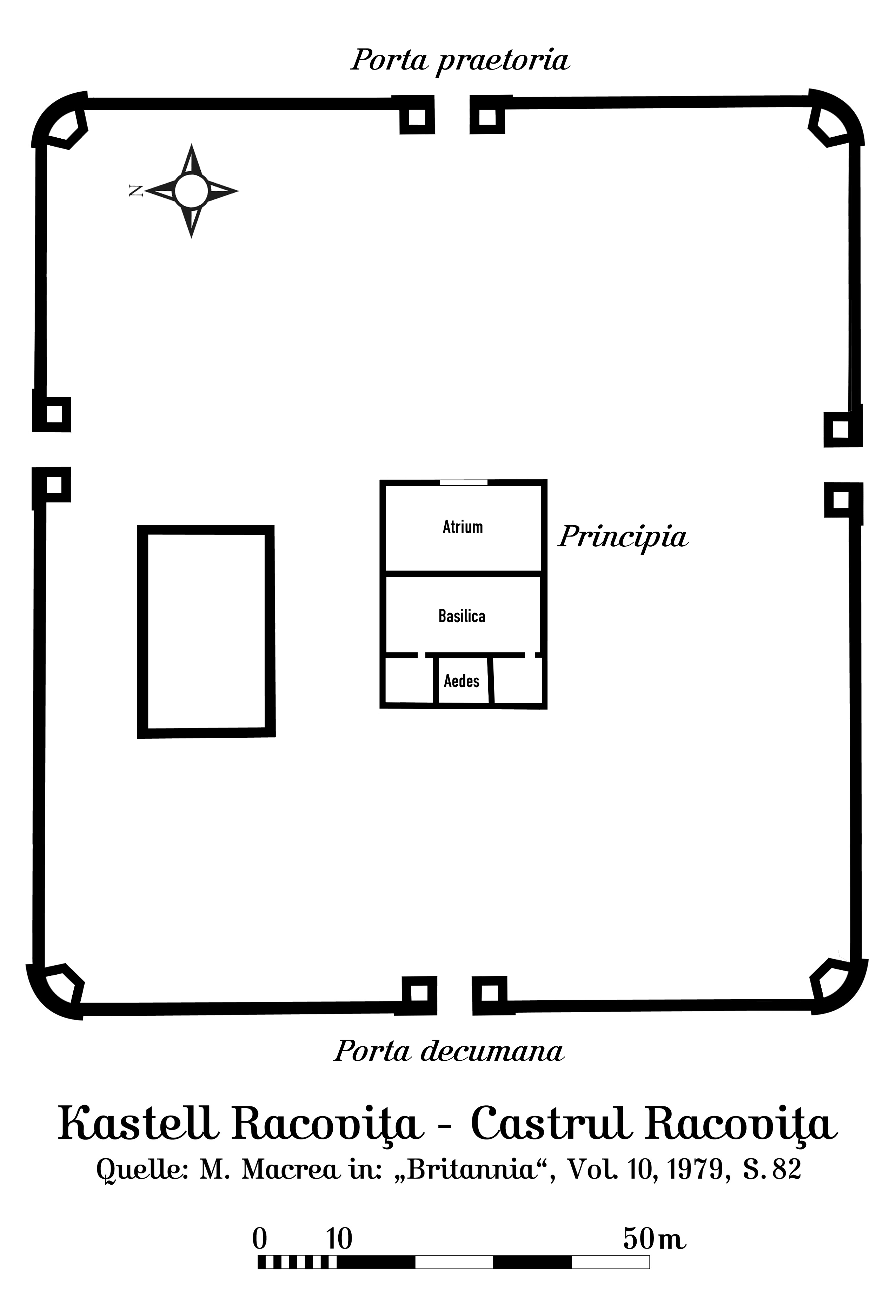 Das Kastell Racoviţa (Praetorium II) am dakischen Limes, Rumänien.